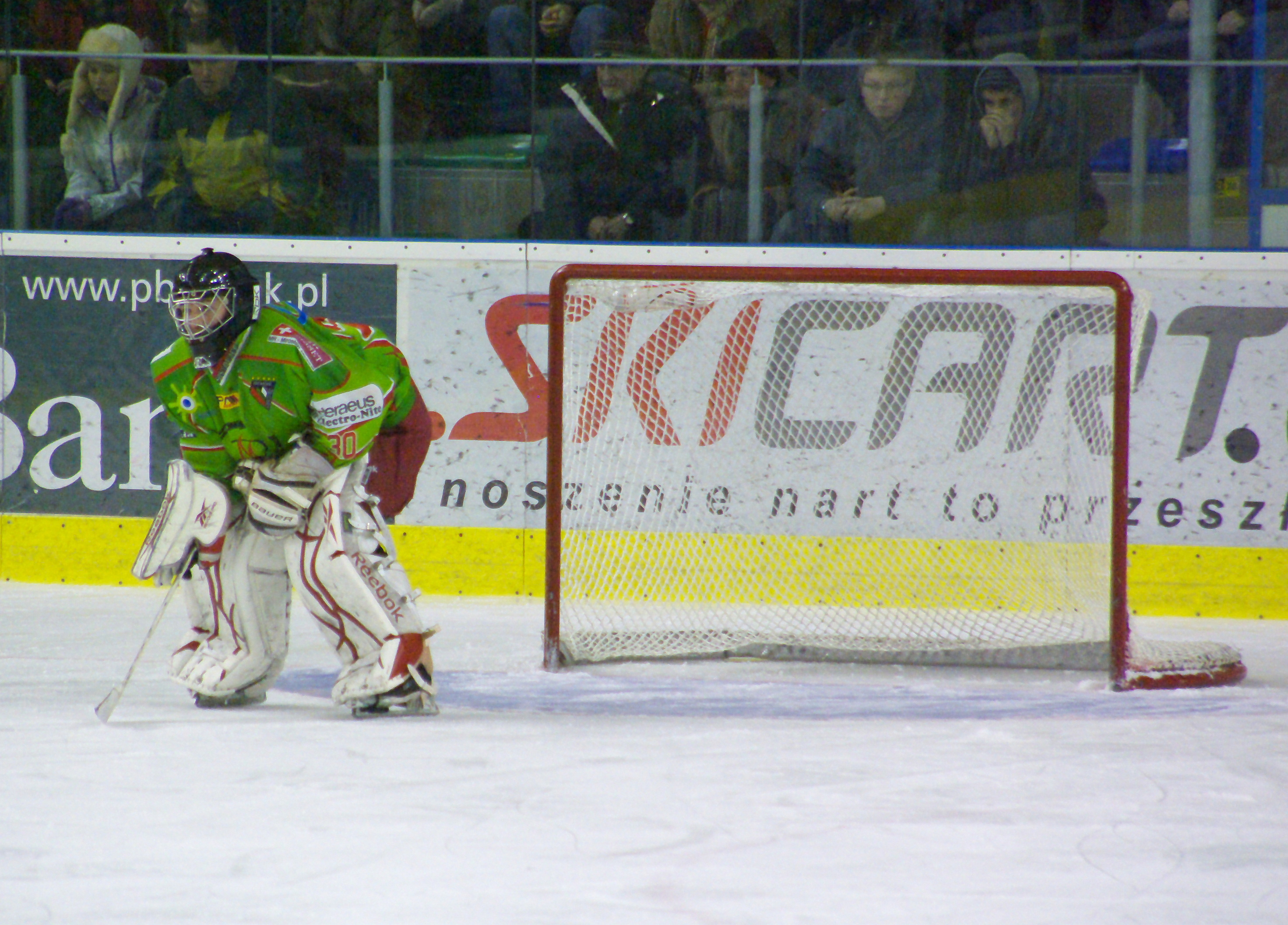 Zbigniew Szydłowski w barwach Zagłębia Sosnowiec w meczu z Ciarko PBS Bank Sanok (Arena Sanok 10 lutego 2012).